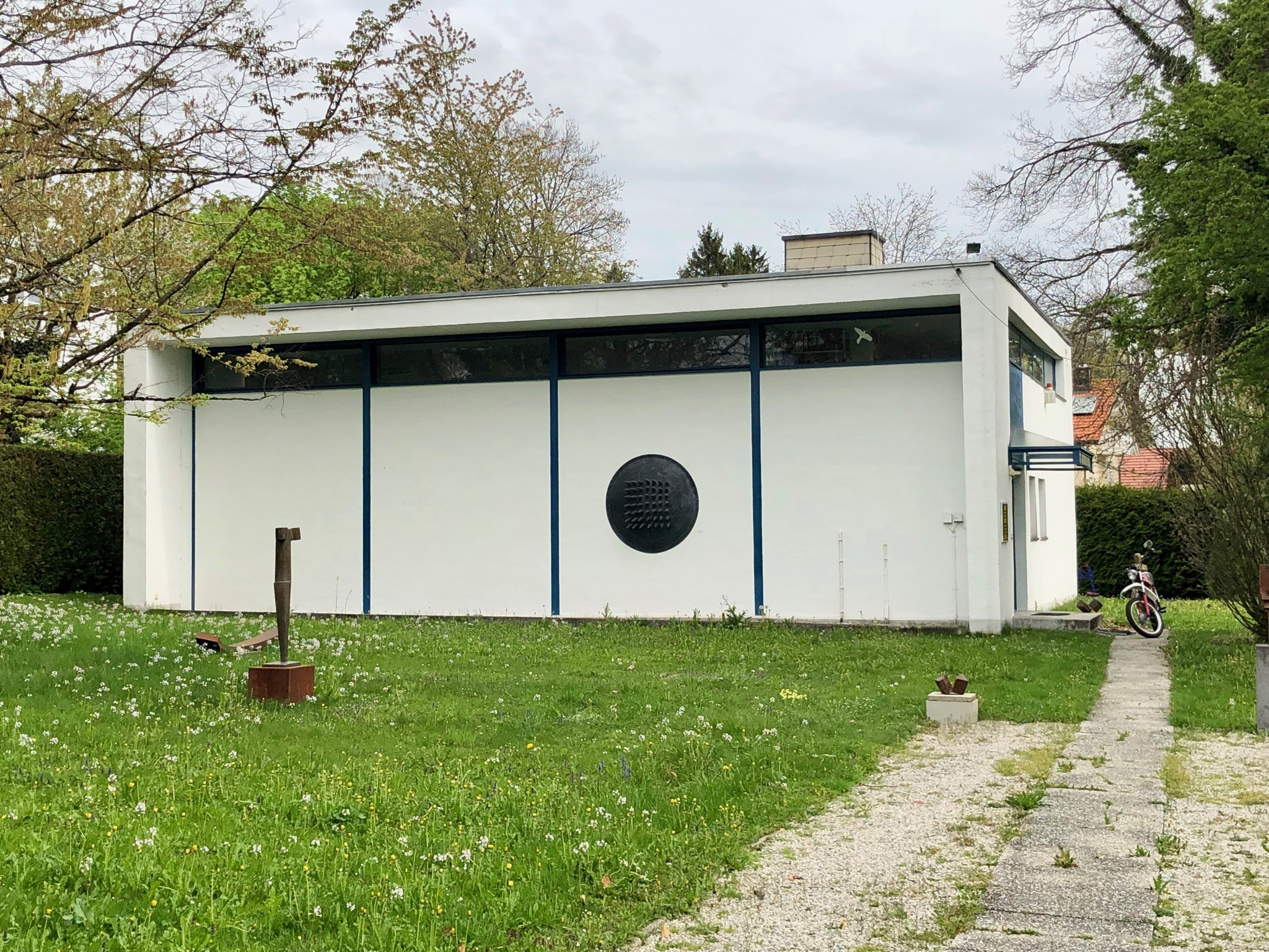 Atelierhaus des Malers Fritz Winter: freistehender, kubischer Flachdachbau mit großem Altelierfenster nach Norden und umlaufendem Lichtband, von Gustav Hassenpflug, 1961/62